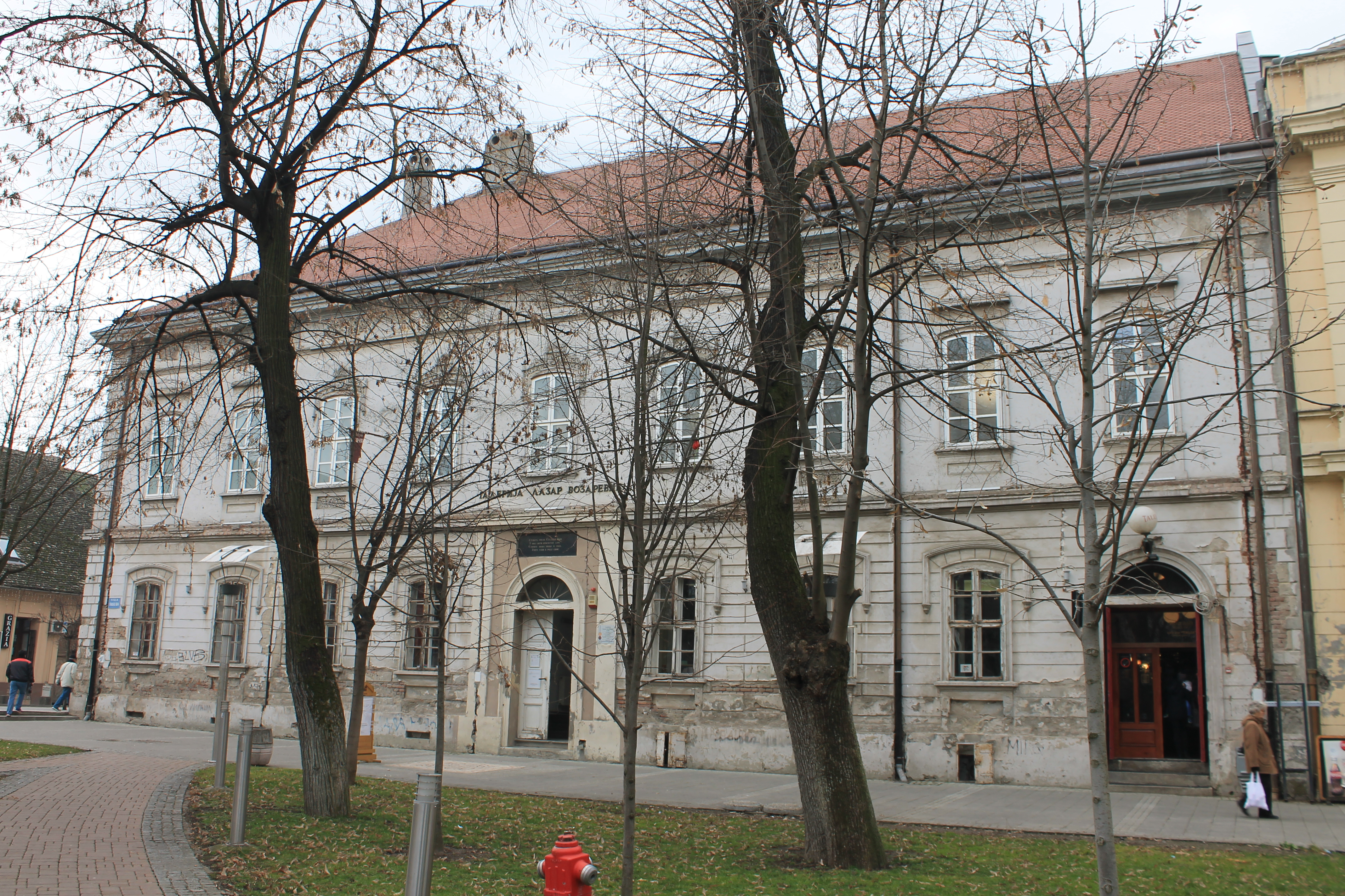 Galerija Lazar Vozarević, Sremska Mitrovica